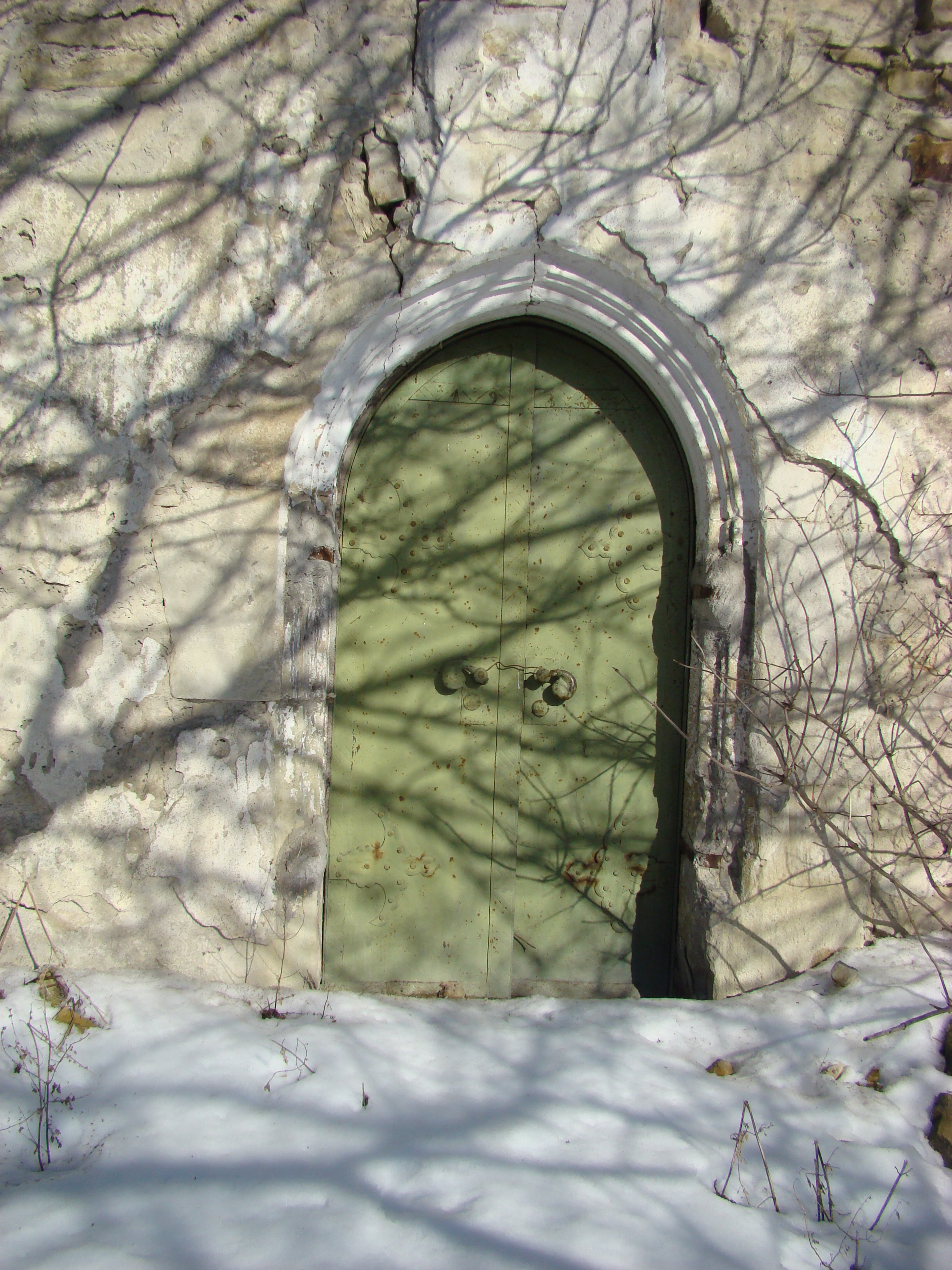 Biserica reformată din Orman, județul Cluj